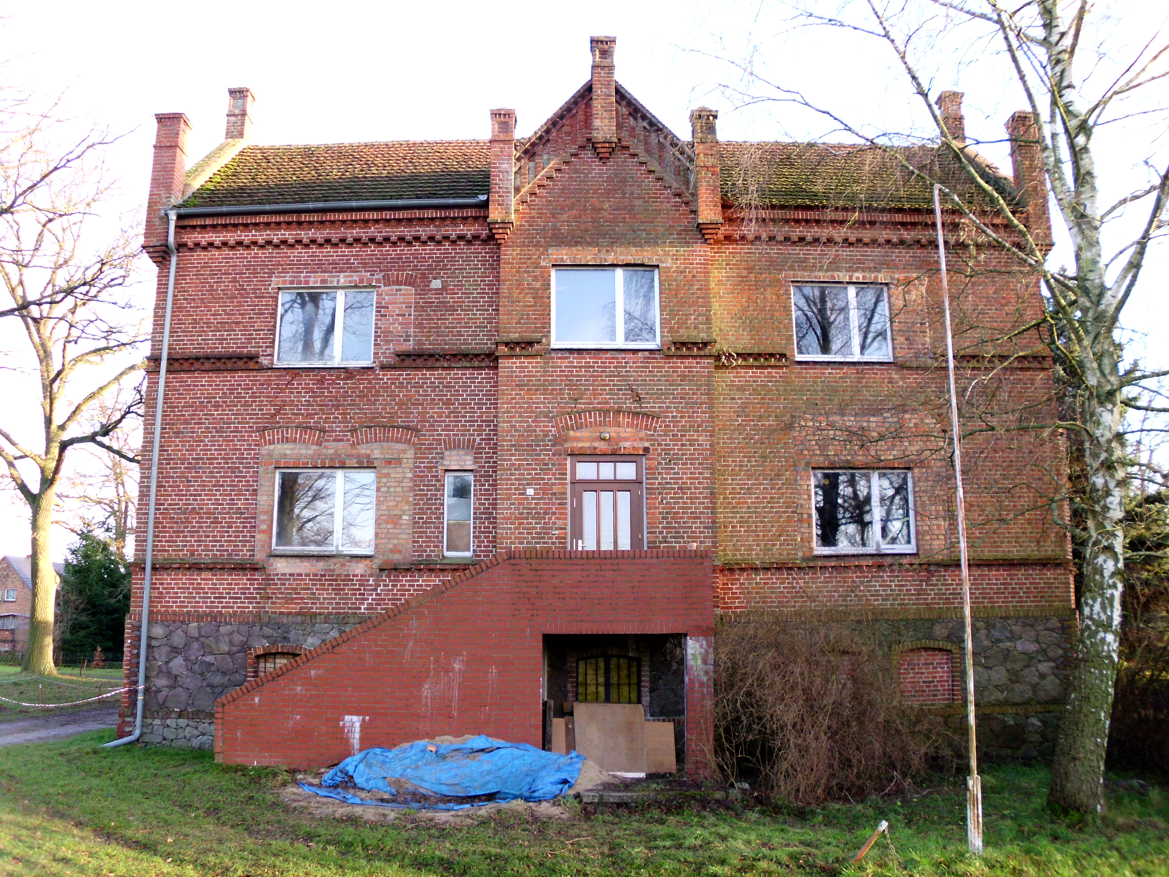 denkmalgeschütztes Gebäude Unter den Linden 13 in Dannhof, Gemeinde Groß Pankow, Landkreis Prignitz